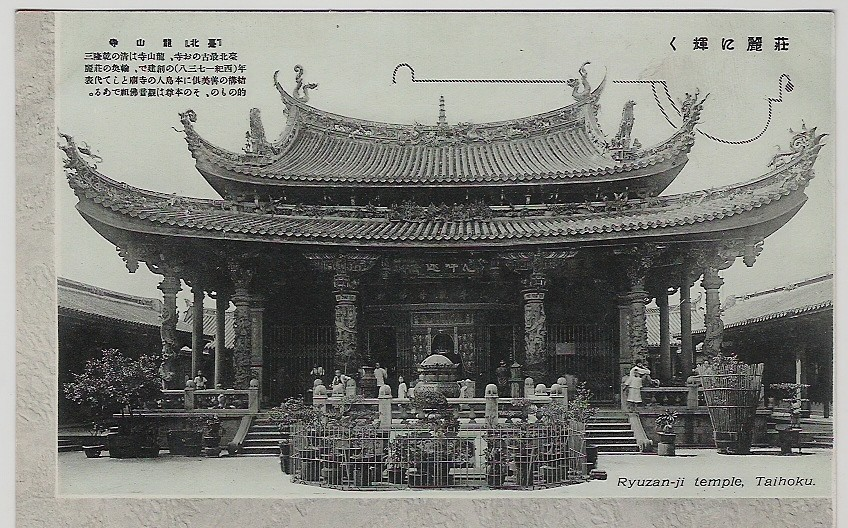 日治時期的臺北龍山寺